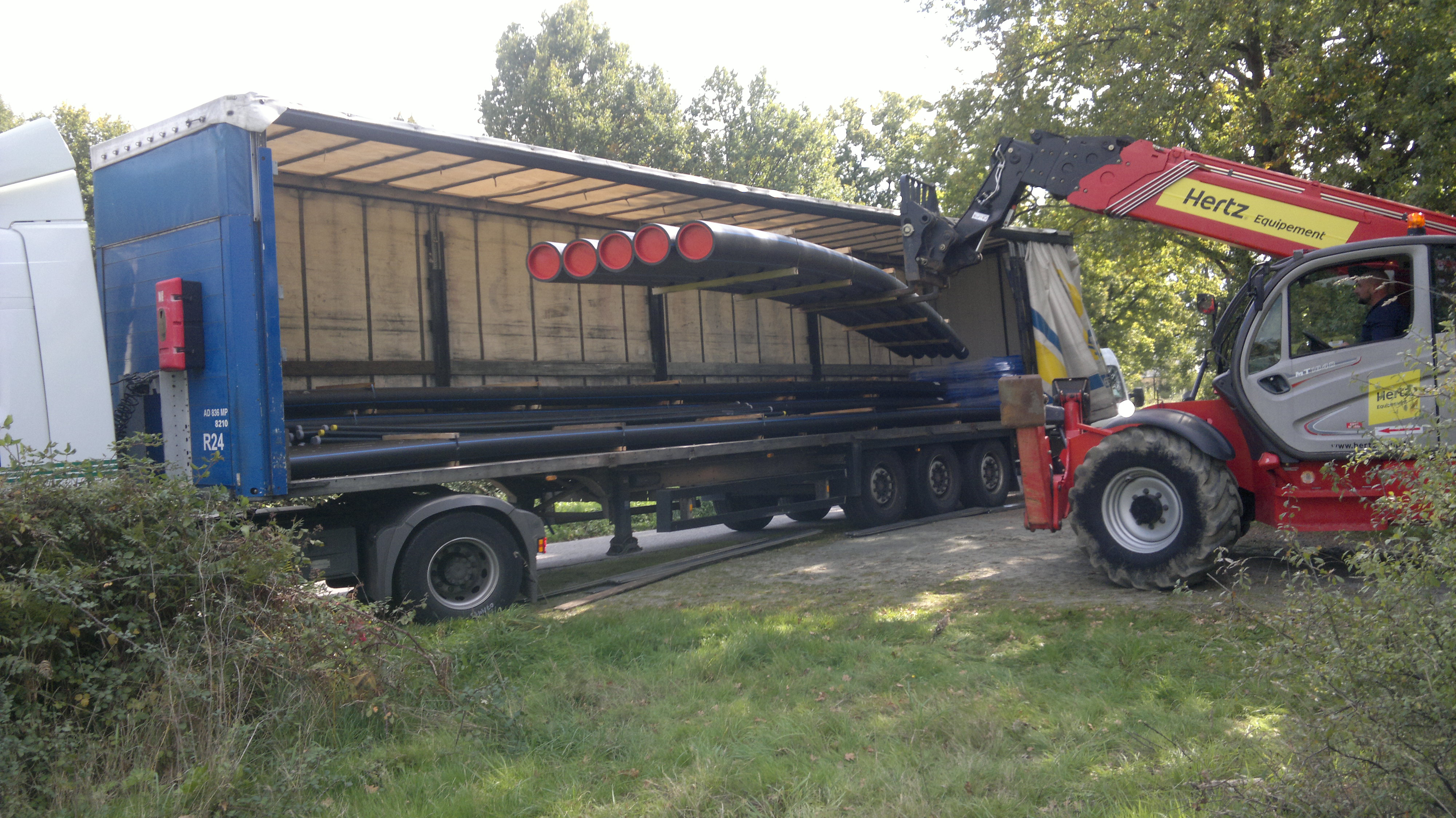 Semi-remorque Tautliner ouverture latérale grandes longueurs.